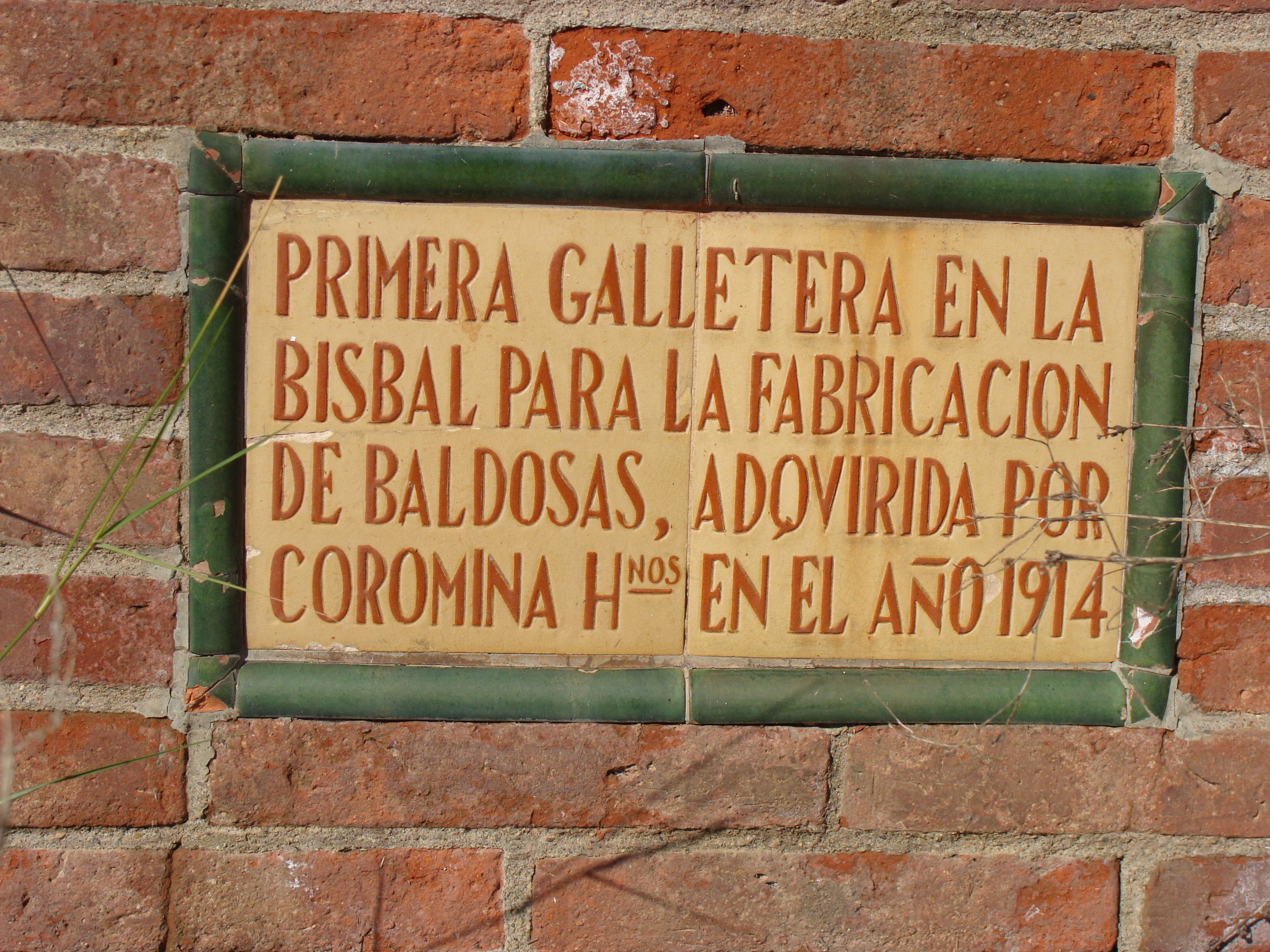 Picture of a chimney in la Bisbal d'Empordà. See Llista de xemeneies a la Bisbal d'Empordà.